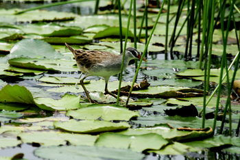 นกอัญชันคิ้วขาว